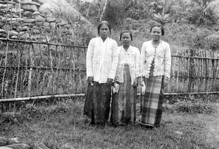 Repronegatief. Een goeroevrouw en twee vrouwen van adel te Bassean